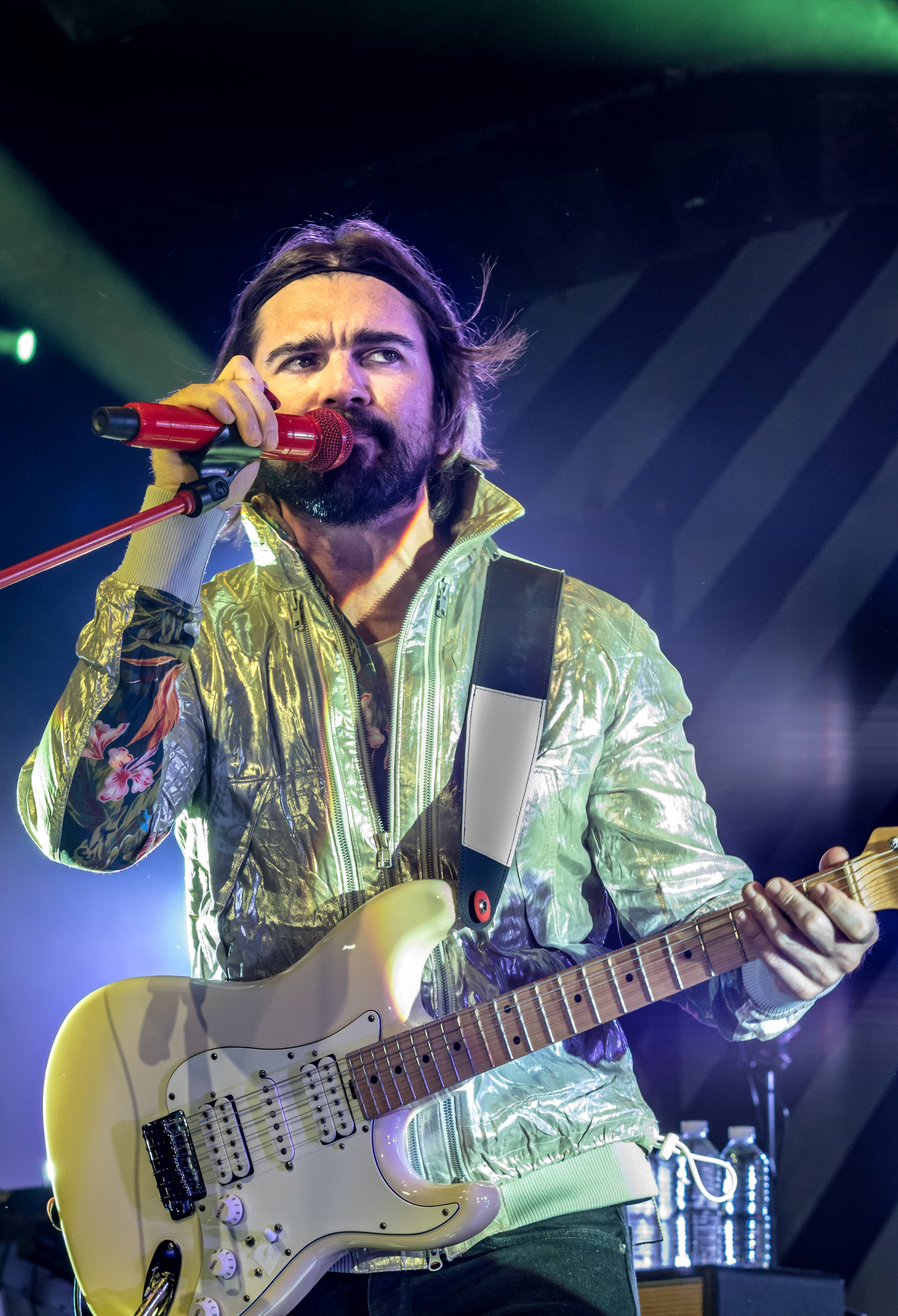 Bilder vom ZMF 2015 JUANES am 18. Juli 2015